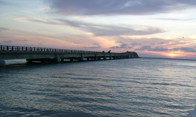 Puente El Zacatal, Ciudad del Camen, Campeche, México